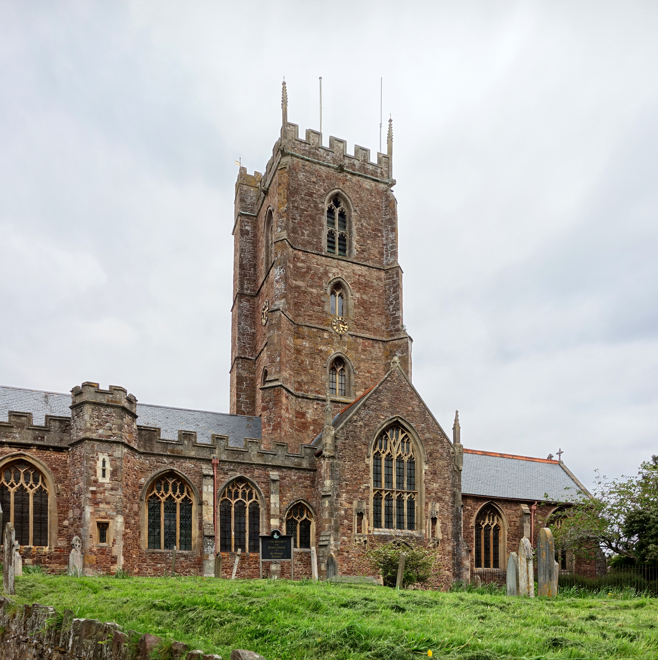 Le prieuré de Dunster.